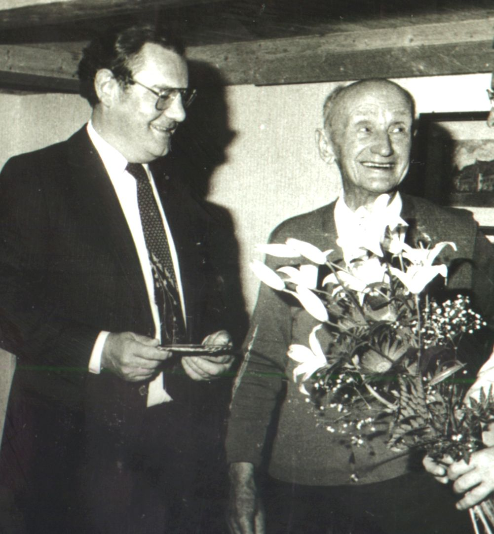 Bürgermeister Josef Mandlmeier und links Landrat Dr. Richard Keßler als Gratulant zum 85. Geburtstag